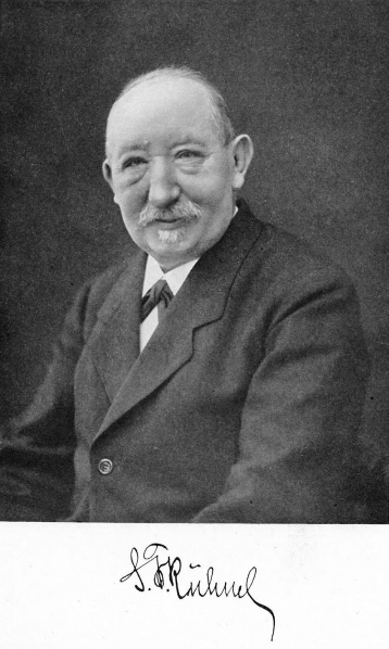 Sophus Frederik Kühnel (1851-1930), Dansk arkitekt